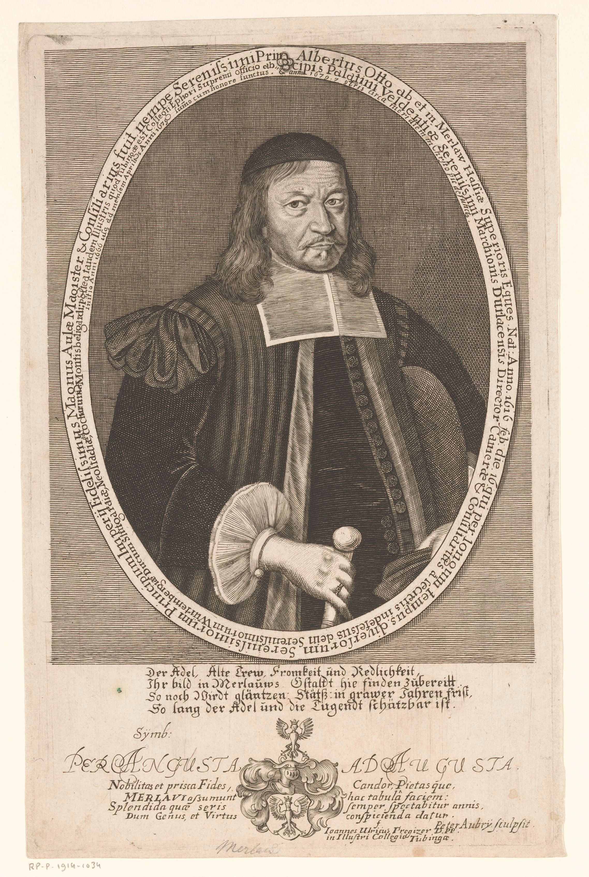 IdentificatieTitel(s): Portret van Albert Otto von MerlawObjecttype: prent Objectnummer: RP-P-1914-1034Opschriften / Merken: verzamelaarsmerk, verso, gestempeld: Lugt 2228VervaardigingVervaardiger: prentmaker: Peter Aubry (II) (vermeld op object)schrijver: Johann Ulrich Pregizer (vermeld op object)Plaats vervaardiging: prentmaker: Straatsburgschrijver: TübingenDatering: in of na 1679 - in of na 1686Fysieke kenmerken: gravureMateriaal: papier Techniek: graveren (drukprocedé)Afmetingen: plaatrand: h 252 mm × b 158 mmOnderwerpWat: historical personsarmorial bearing, heraldryWie: Albert Otto von MerlawVerwerving en rechtenVerwerving: aankoop 1905Copyright: Publiek domein